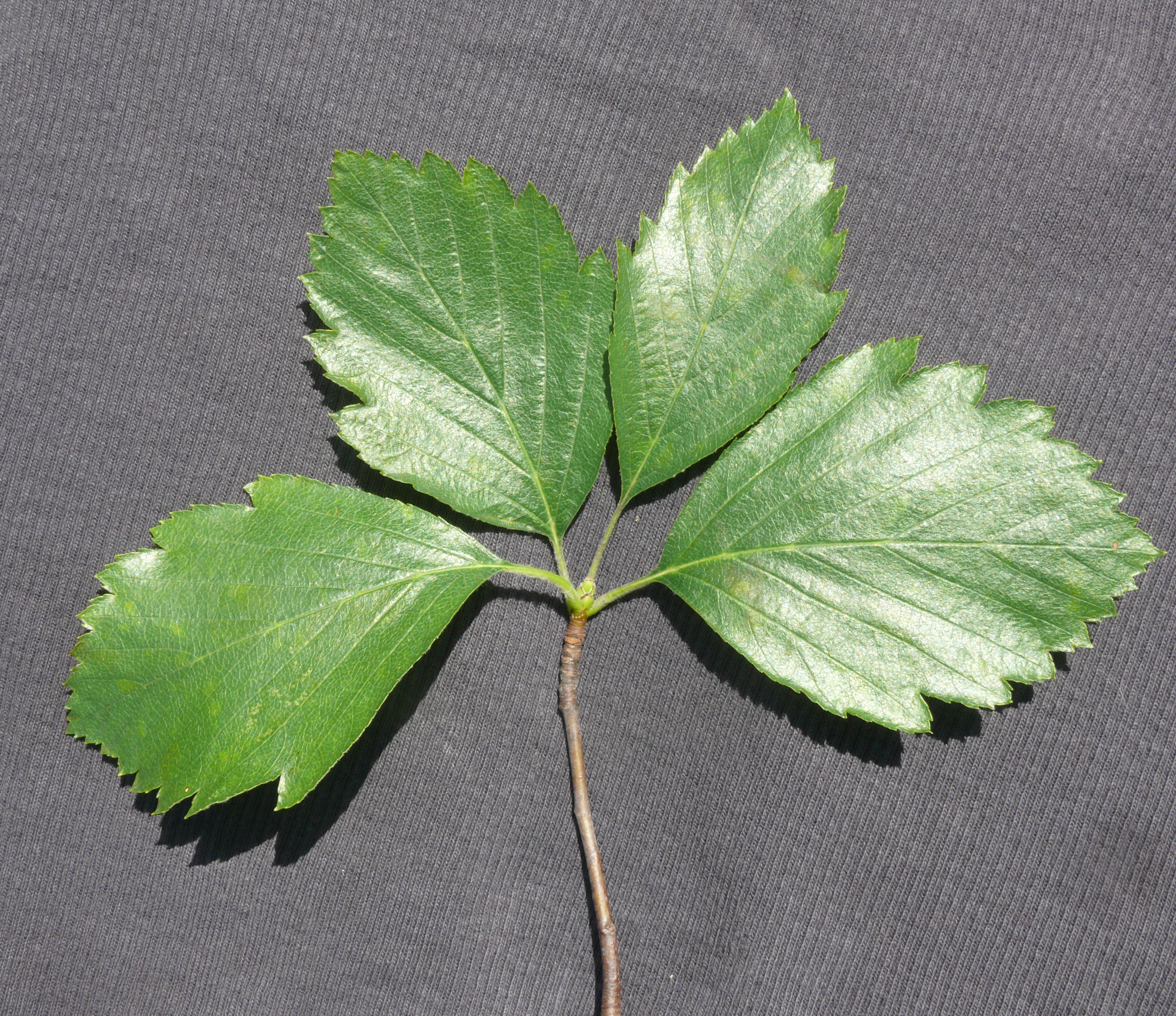 Sorbus franconica, Kurztrieb, Nördliche Frankenalb